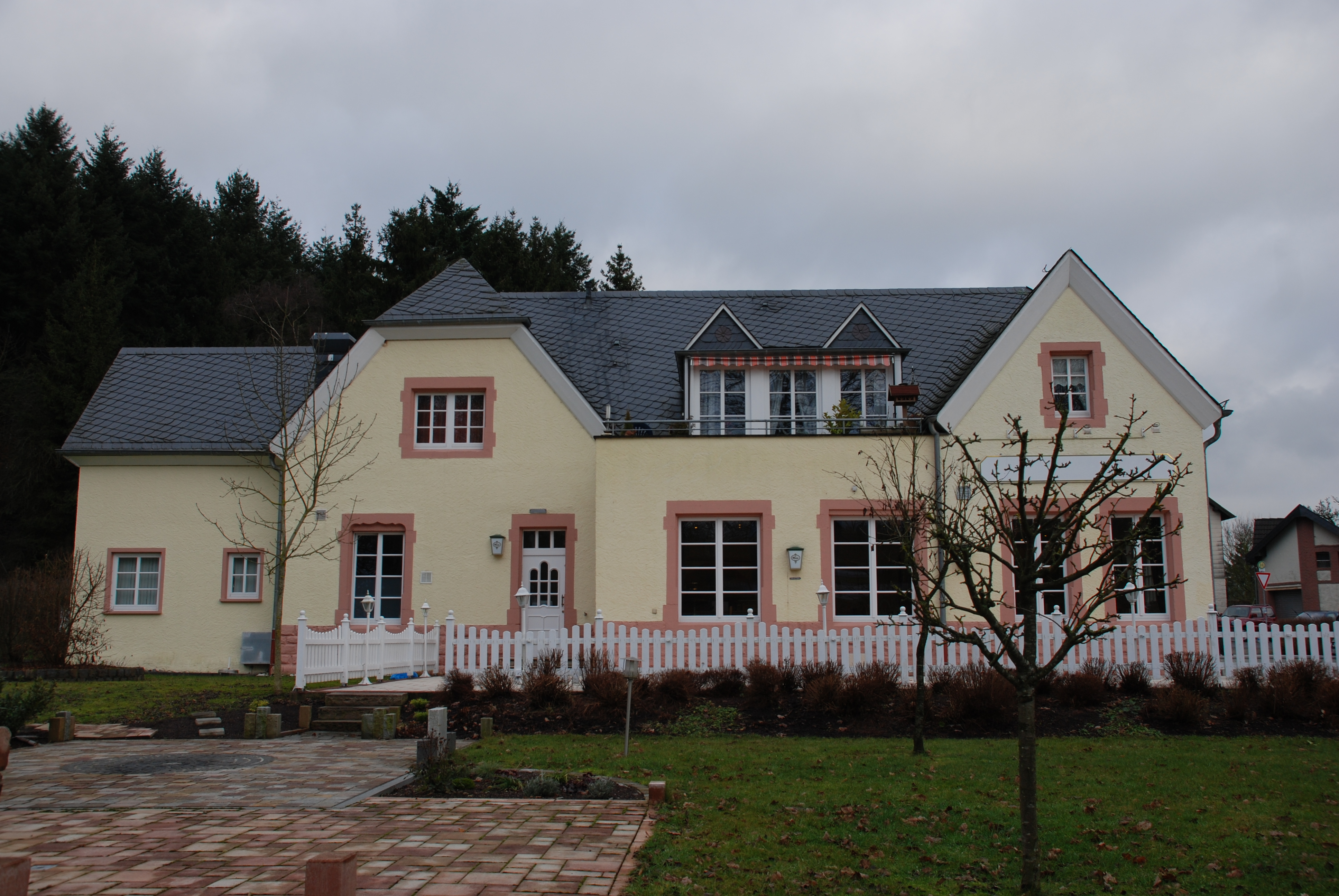 Altes Bahnhofsgebäude in Bleialf